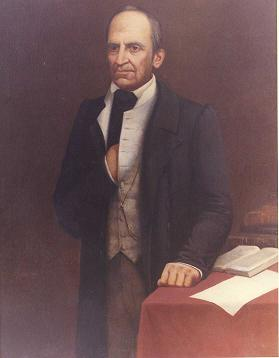 Portrait of Pedro Gual Escandon